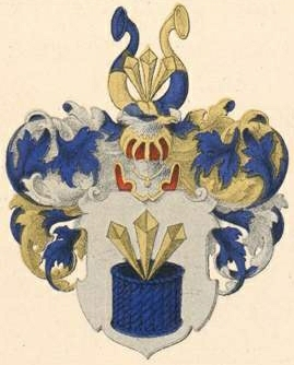 Strahlborni suguvõsa aadlivapp